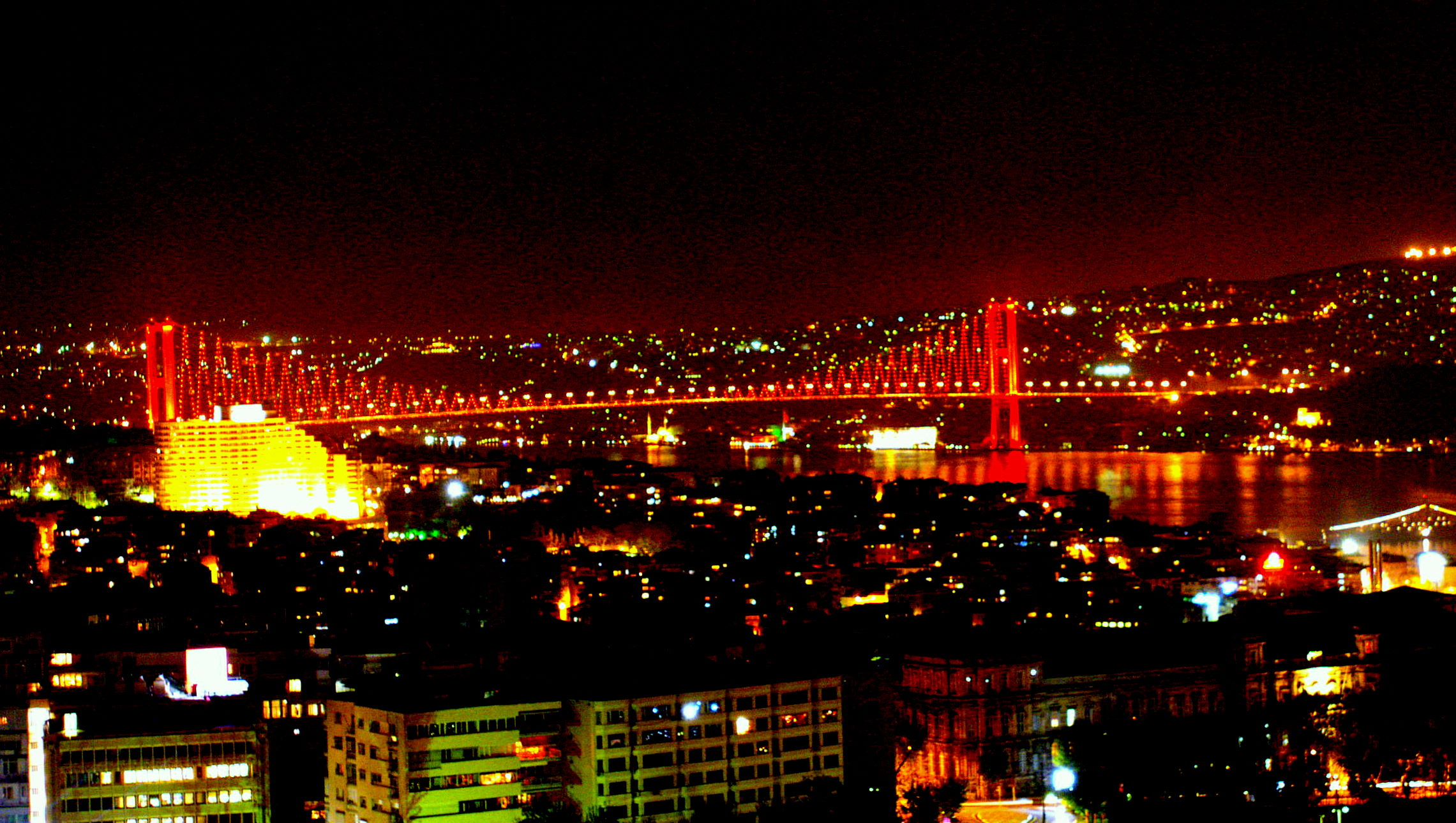 Türkiye İstanbul Boğaziçi Köprüsü Işıklandırılmış hali